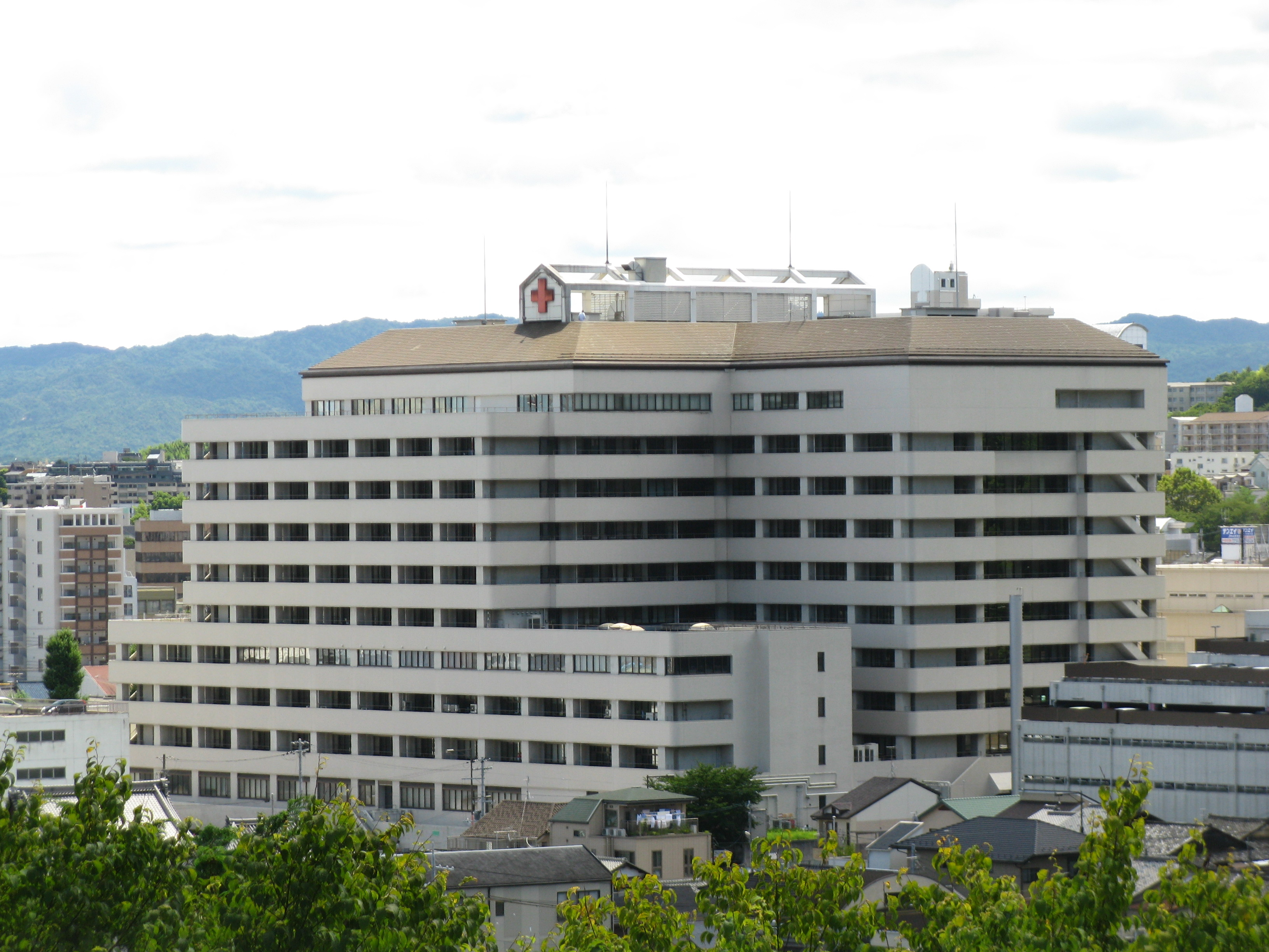 大津赤十字病院